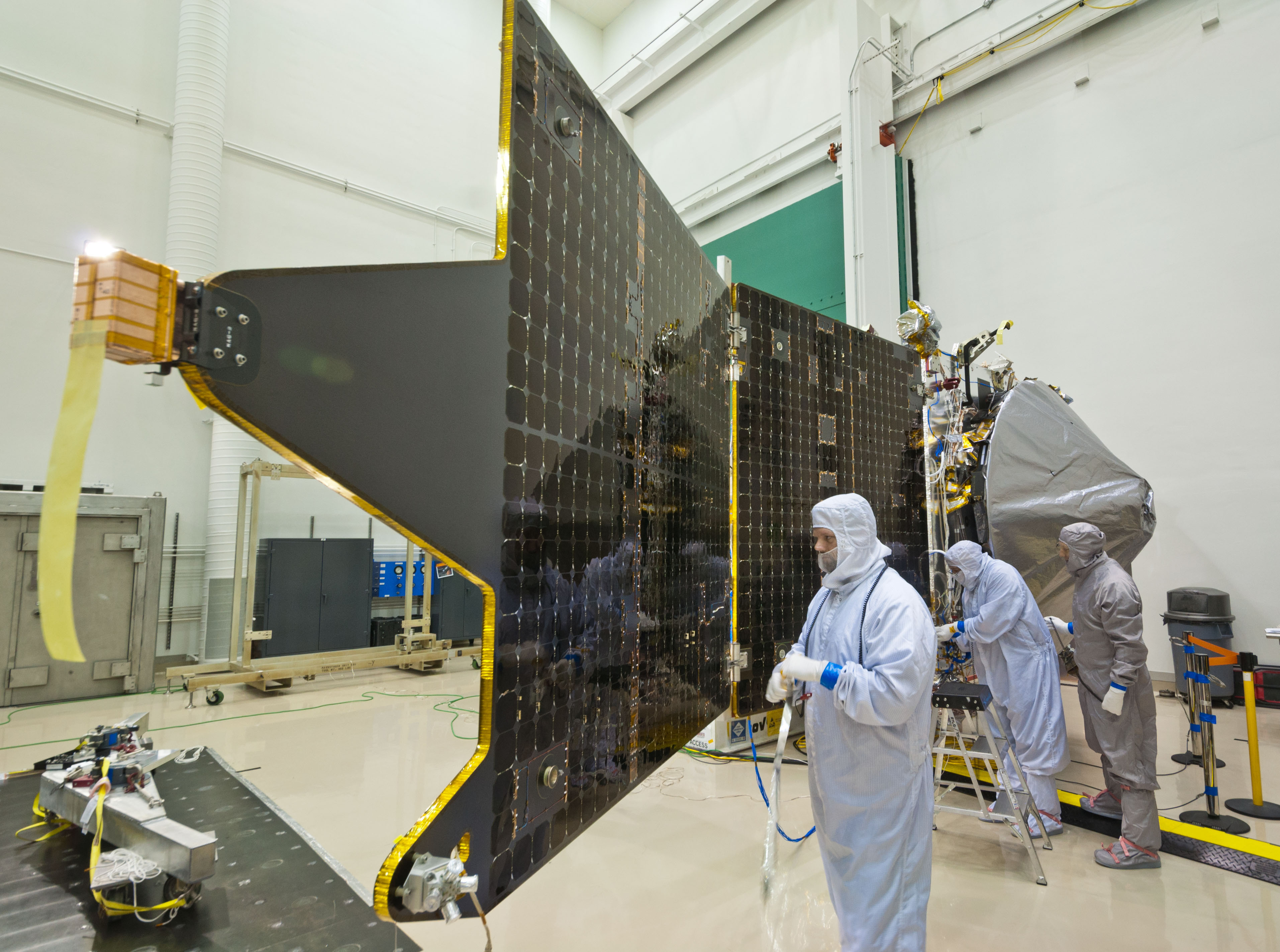 Techniciens de la Lockheed Martin travaillant sur la sonde MAVEN.